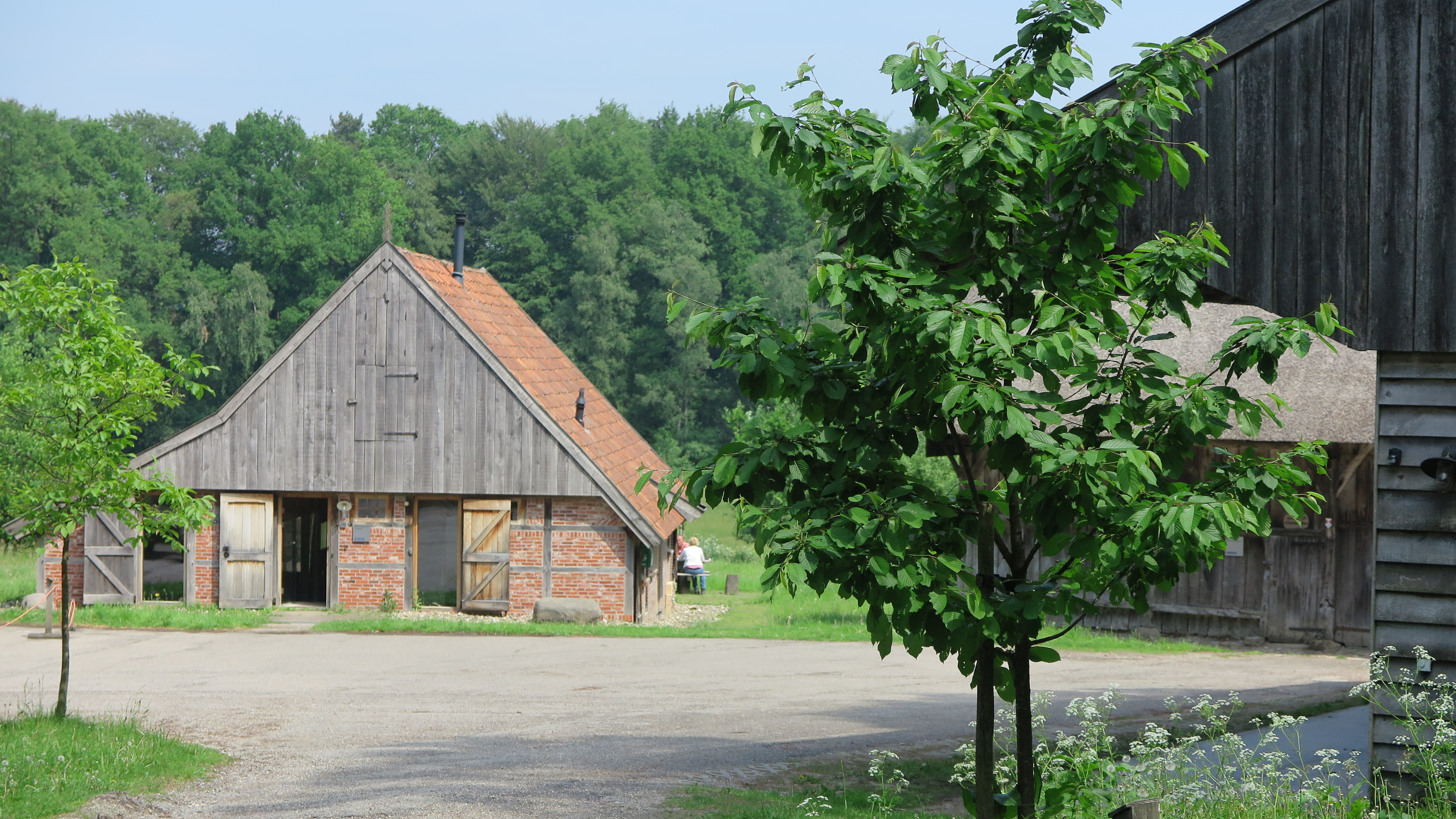 Beheerkantoor Natuurmonumenten Noordoost Twente.